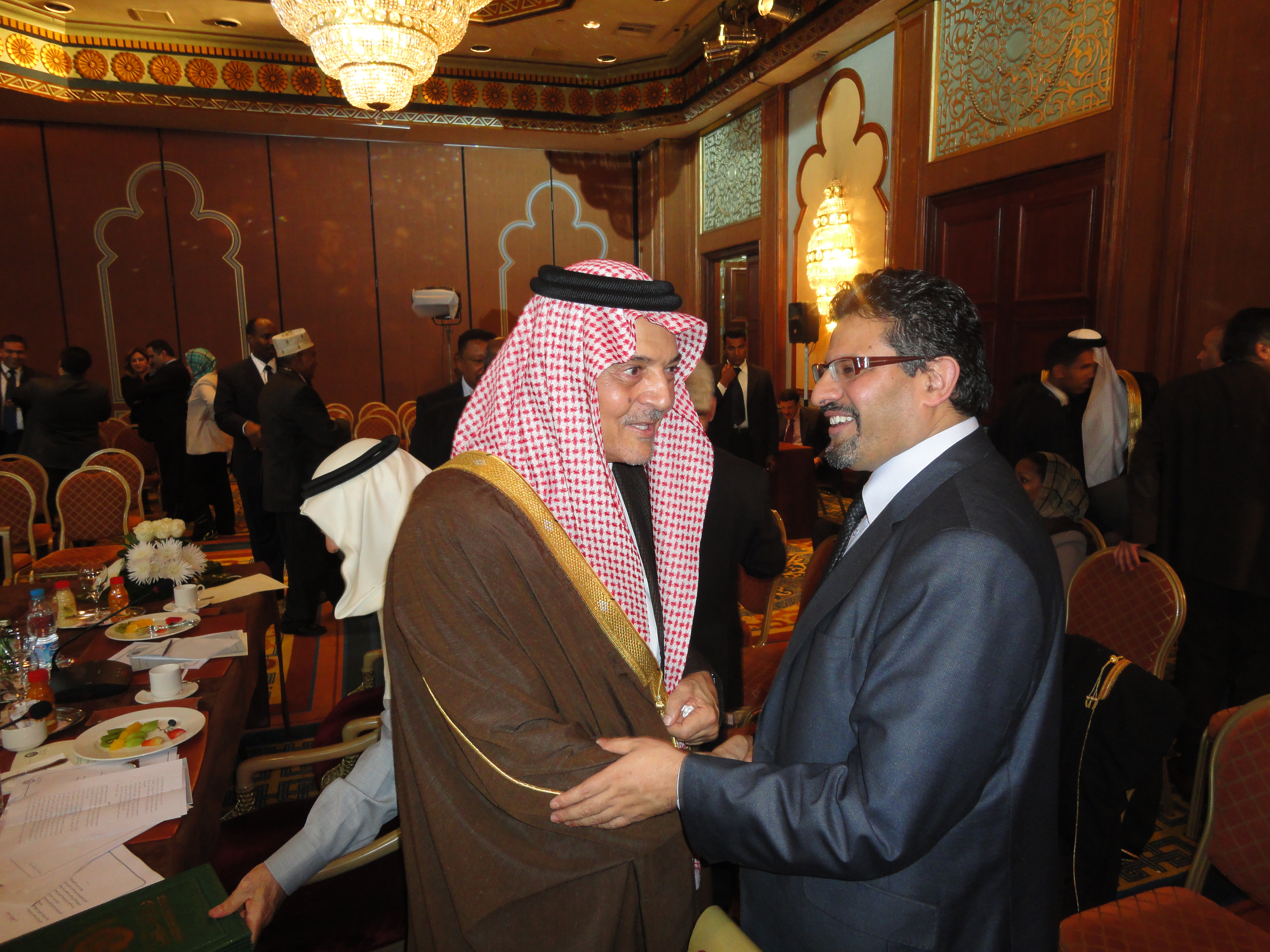 Le Ministre des Affaires Etrangères, Dr Rafik Abdessalem a annoncé, dimanche au Caire, la tenue à Tunis le 24 février courant d'une conférence internationale sur la Syrie.